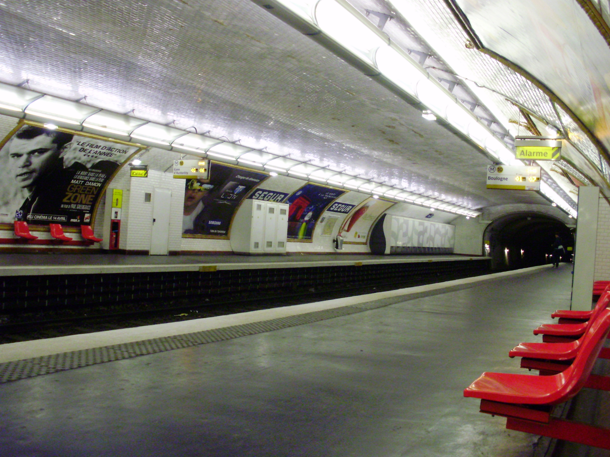 Quais de la station Ségur du métro de Paris